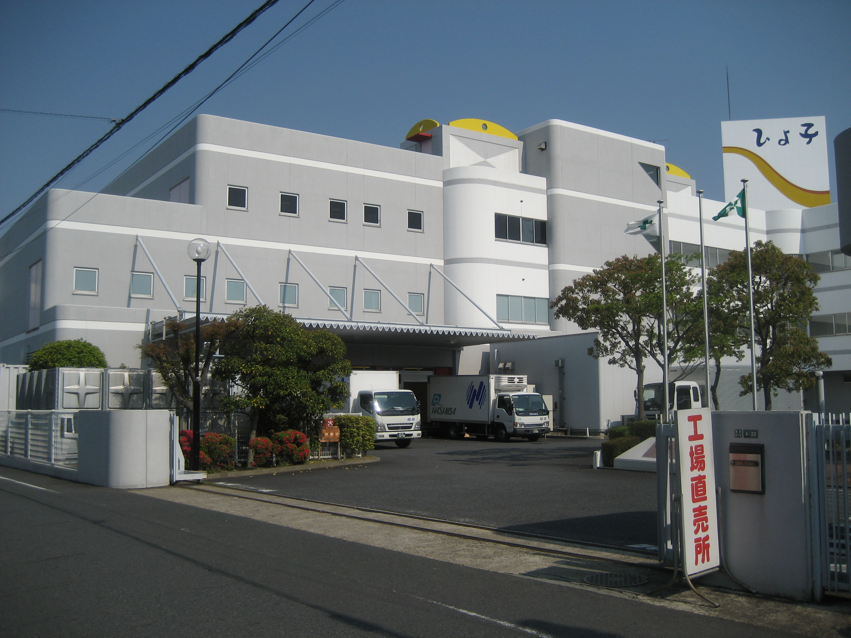 東京ひよこ 東京工場（正門付近を撮影）